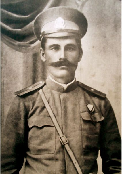 Srpskohrvatski / српскохрватски: Milinko Vlahović